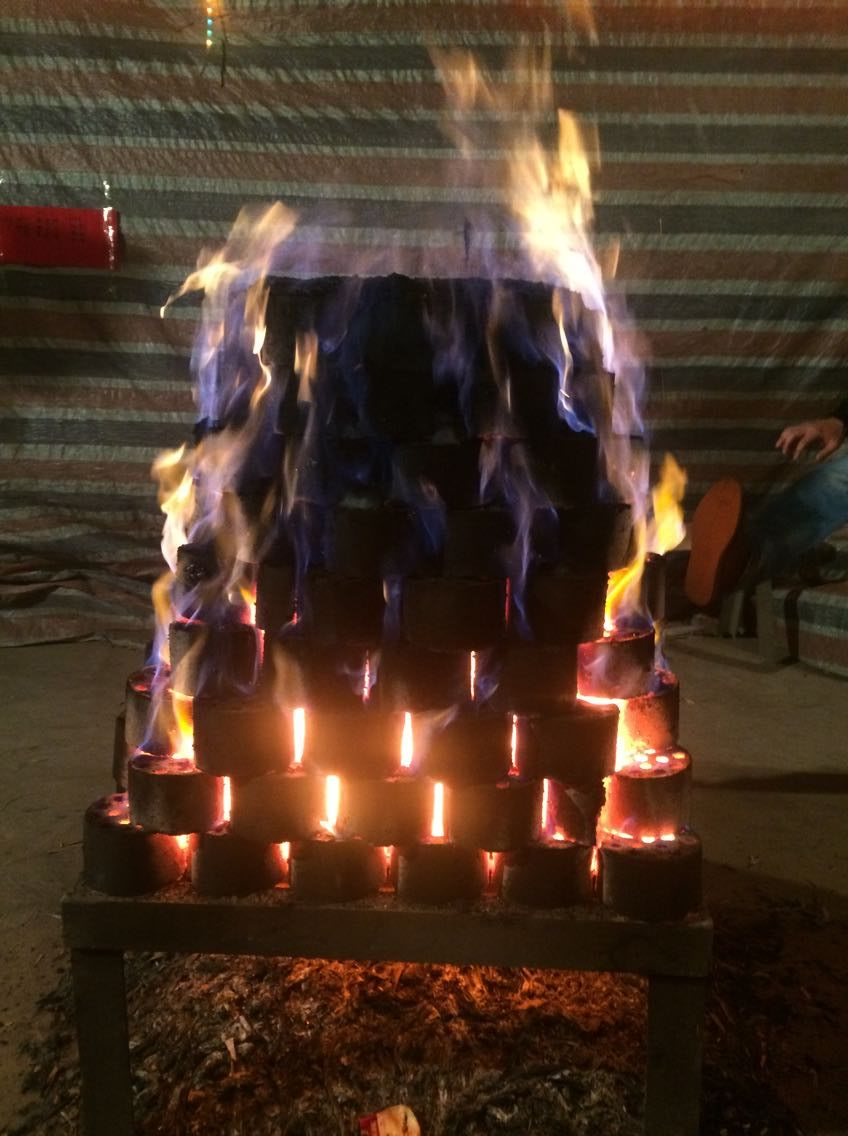 中文（中国大陆）: 山西省zh:交城縣的旺火